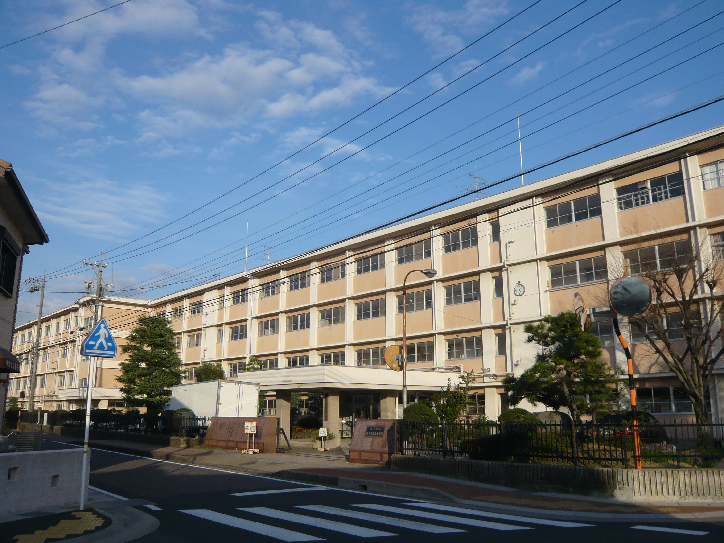 県立岐阜商業高校